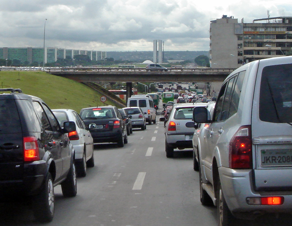 Traffic congestion, Brasília D.F. (Plano Piloto), Brazil